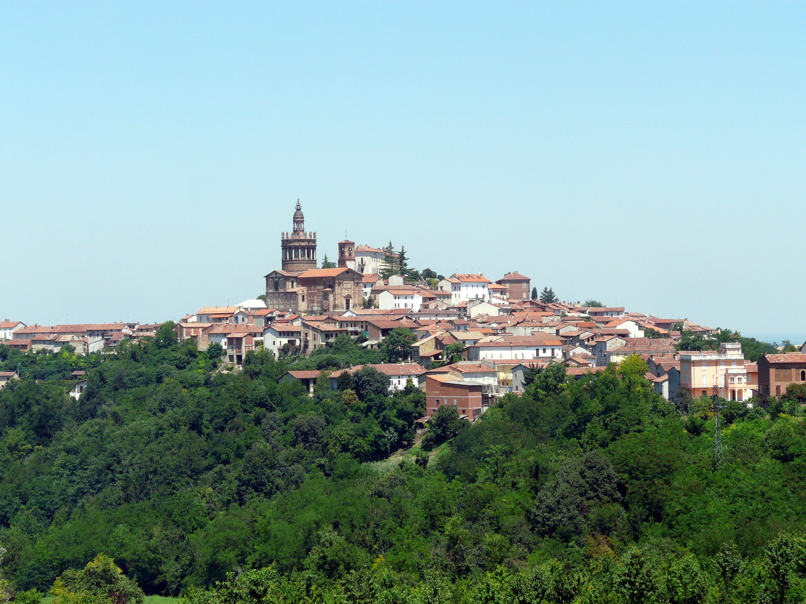 Panorama di Camagna Monferrato, Piemonte, Italia